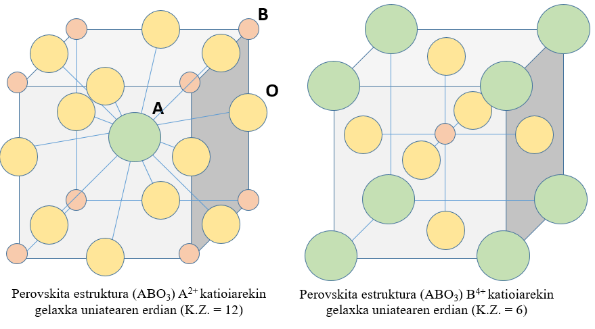 Perovskiten ABO3 estruktura, ezkerrean A gelaxkaren zentroan zentratuta eta eskubian B gelaxkaren zentroan zentratuta.